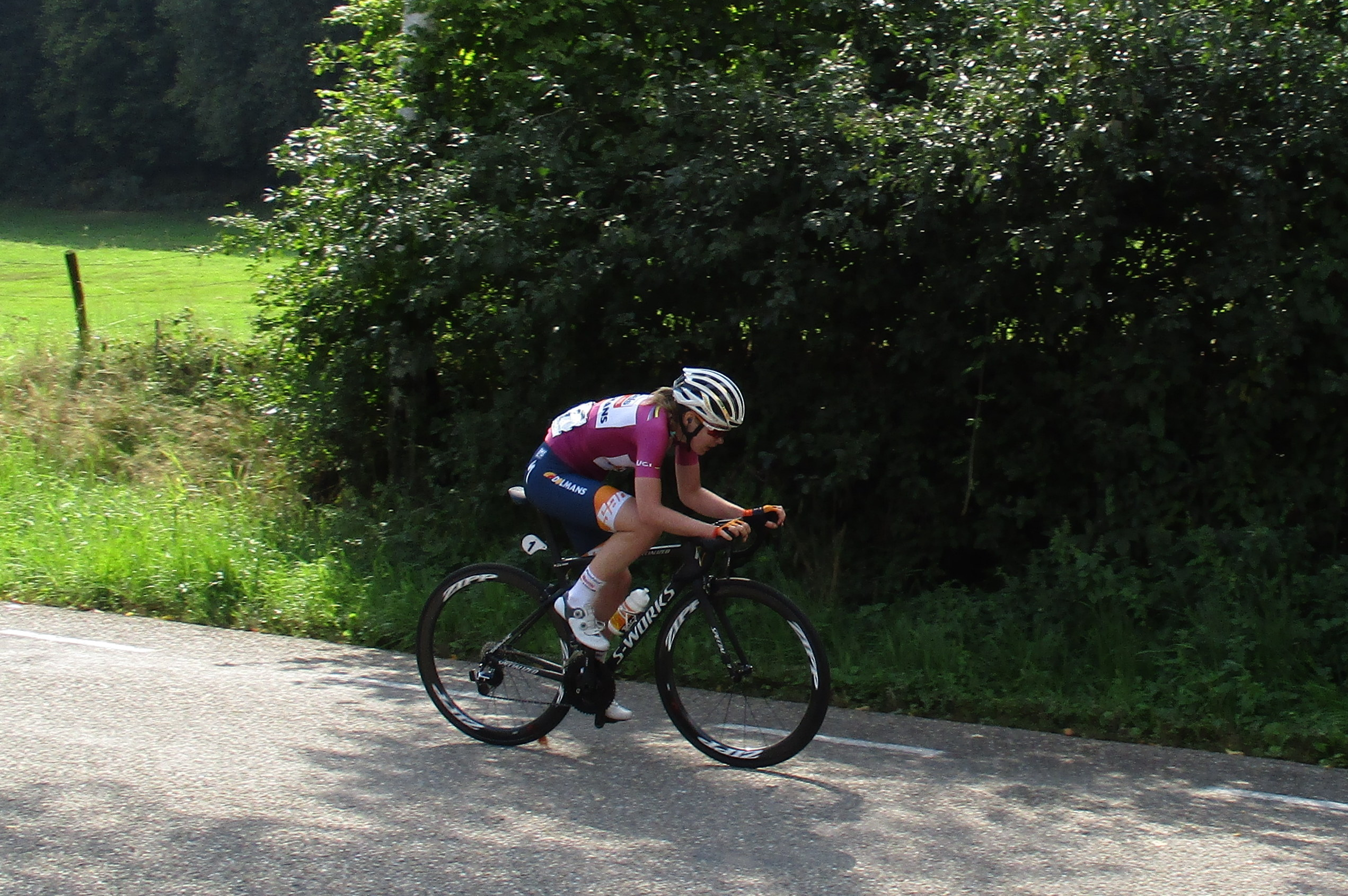 5e etappe van de Boels Ladies Tour 2017 door Zuid-Limburg, finish in Vaals.